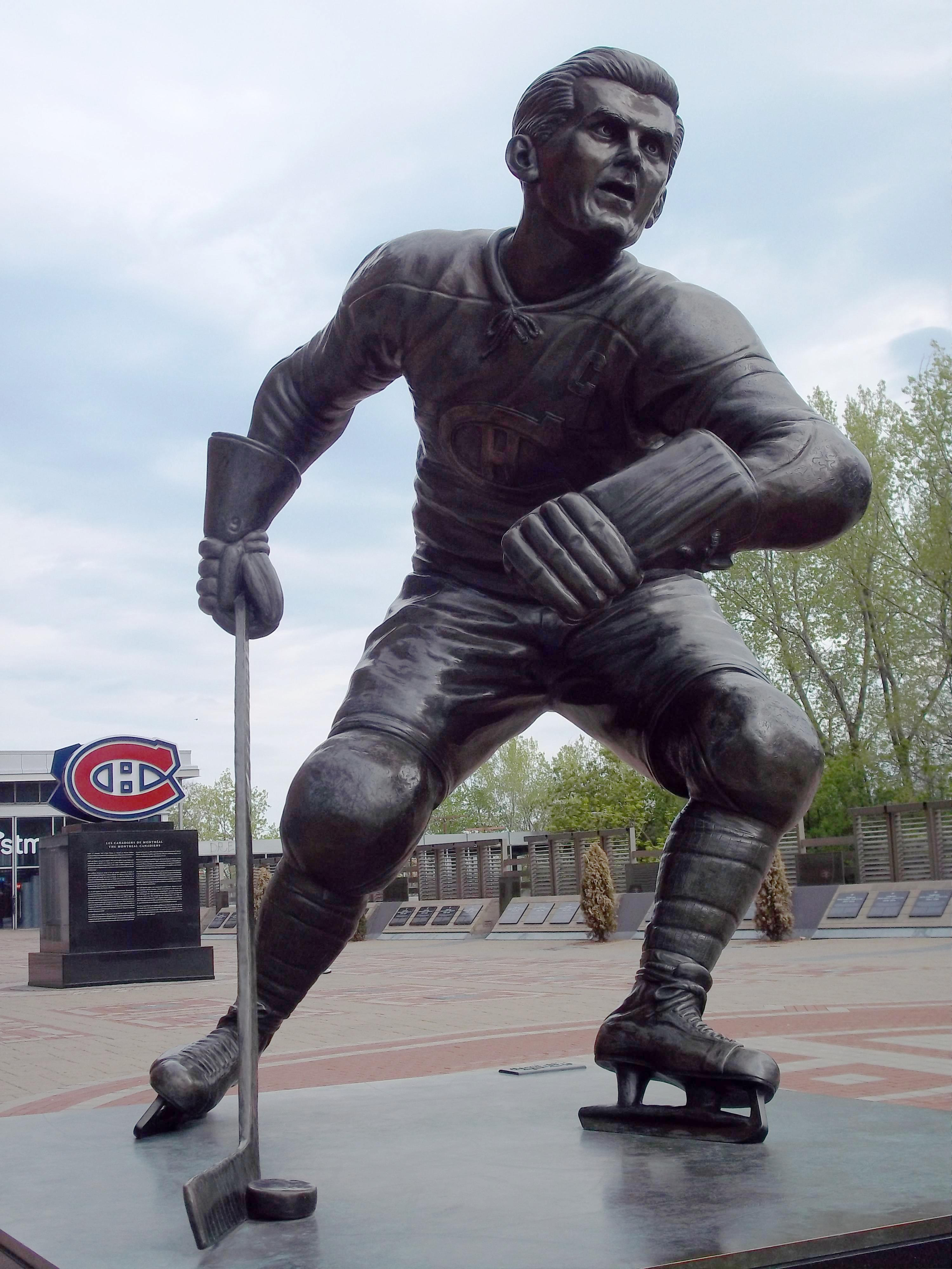 Statue de Maurice Richard, Centre Bell, Montréal